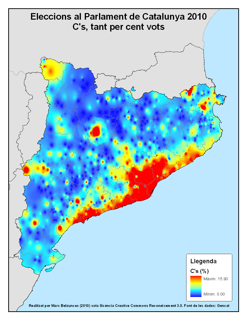 Distribució del vot de C's a les eleccions al Parlament de Catalunya 2010.